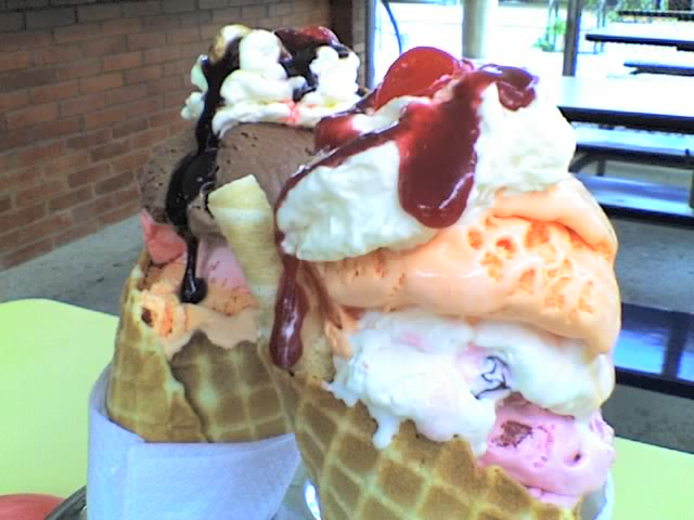 Helados de popsy